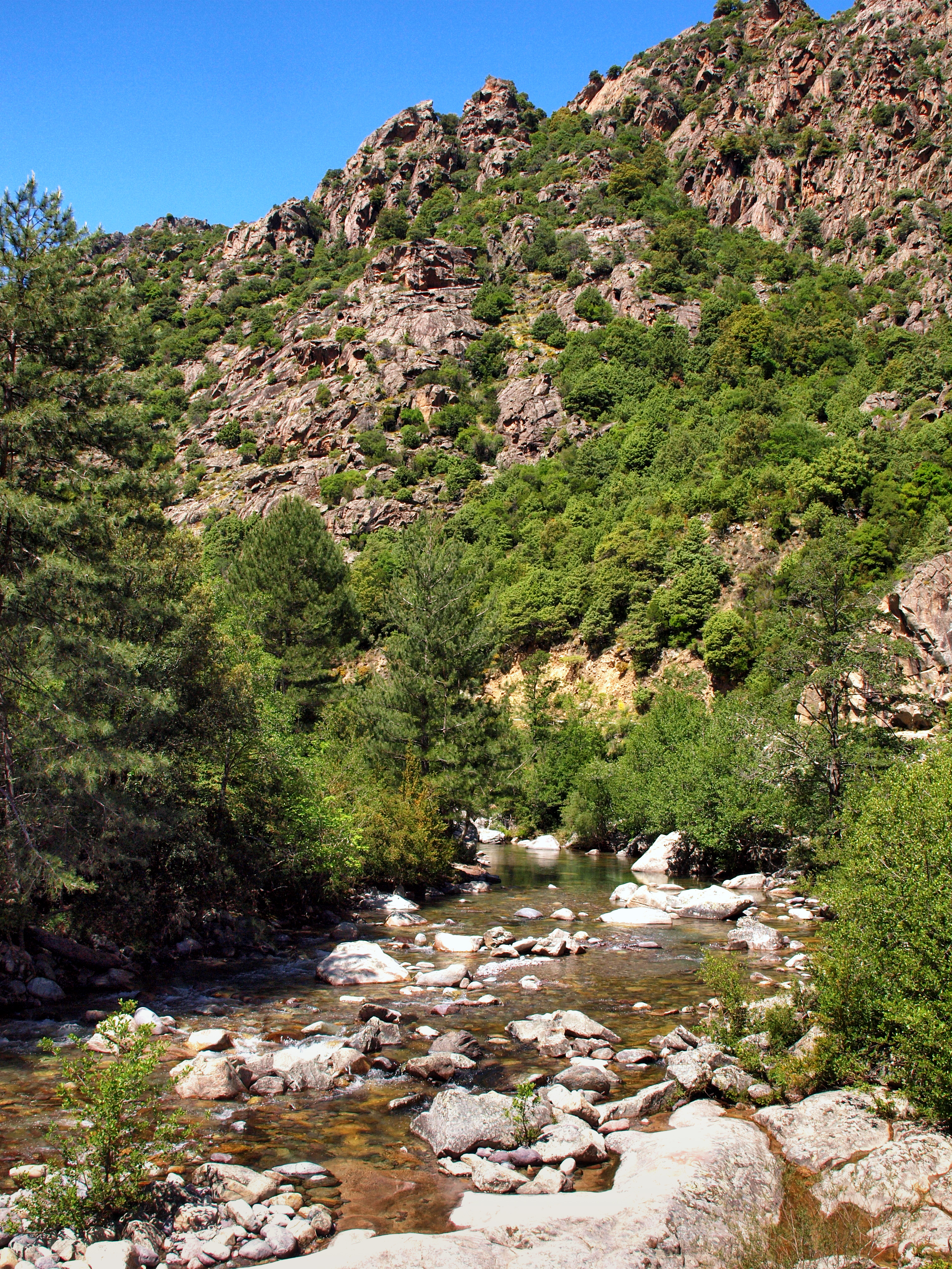 Asco (Corse) - Dans les gorges de l'Asco.